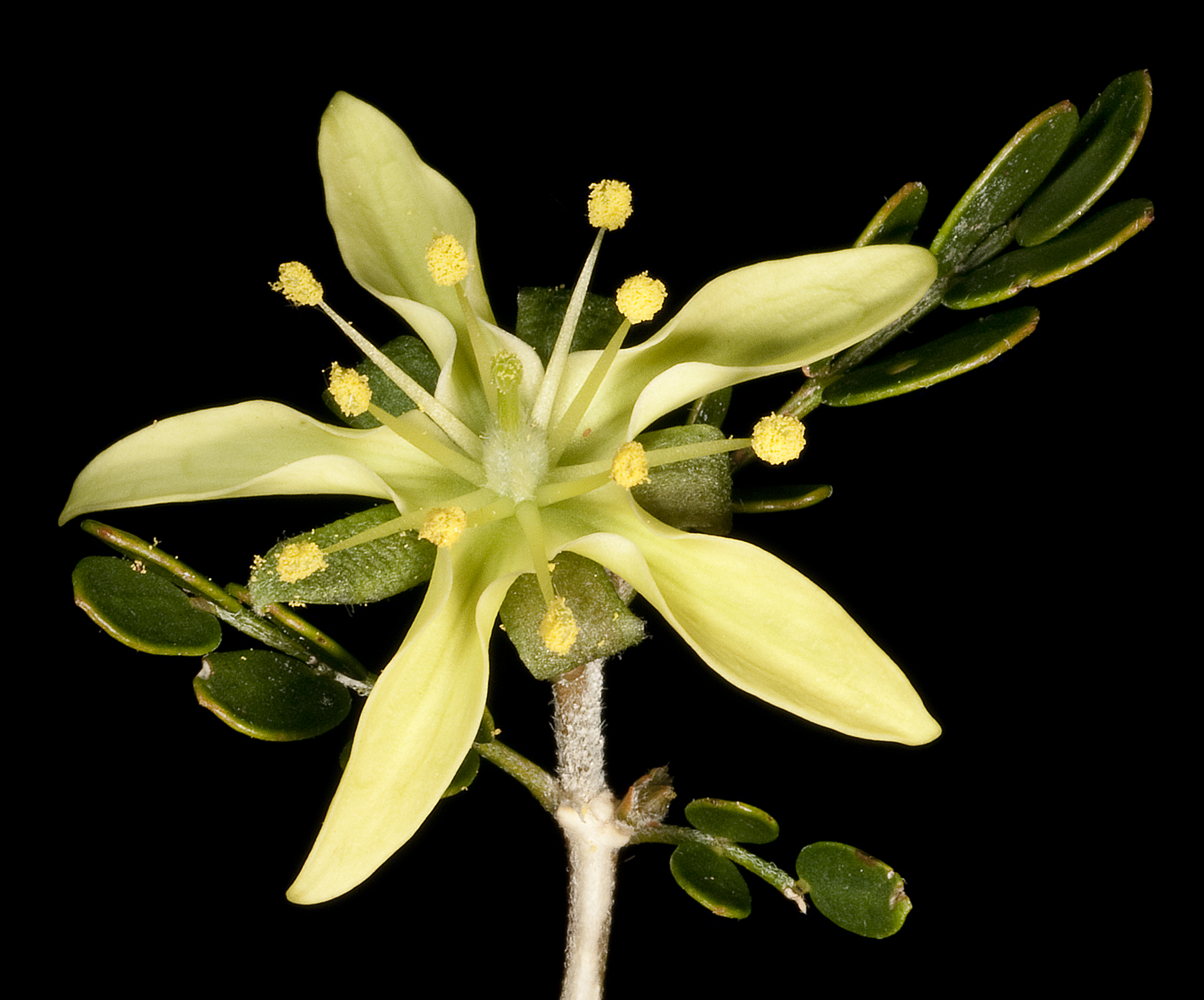 KRT4564